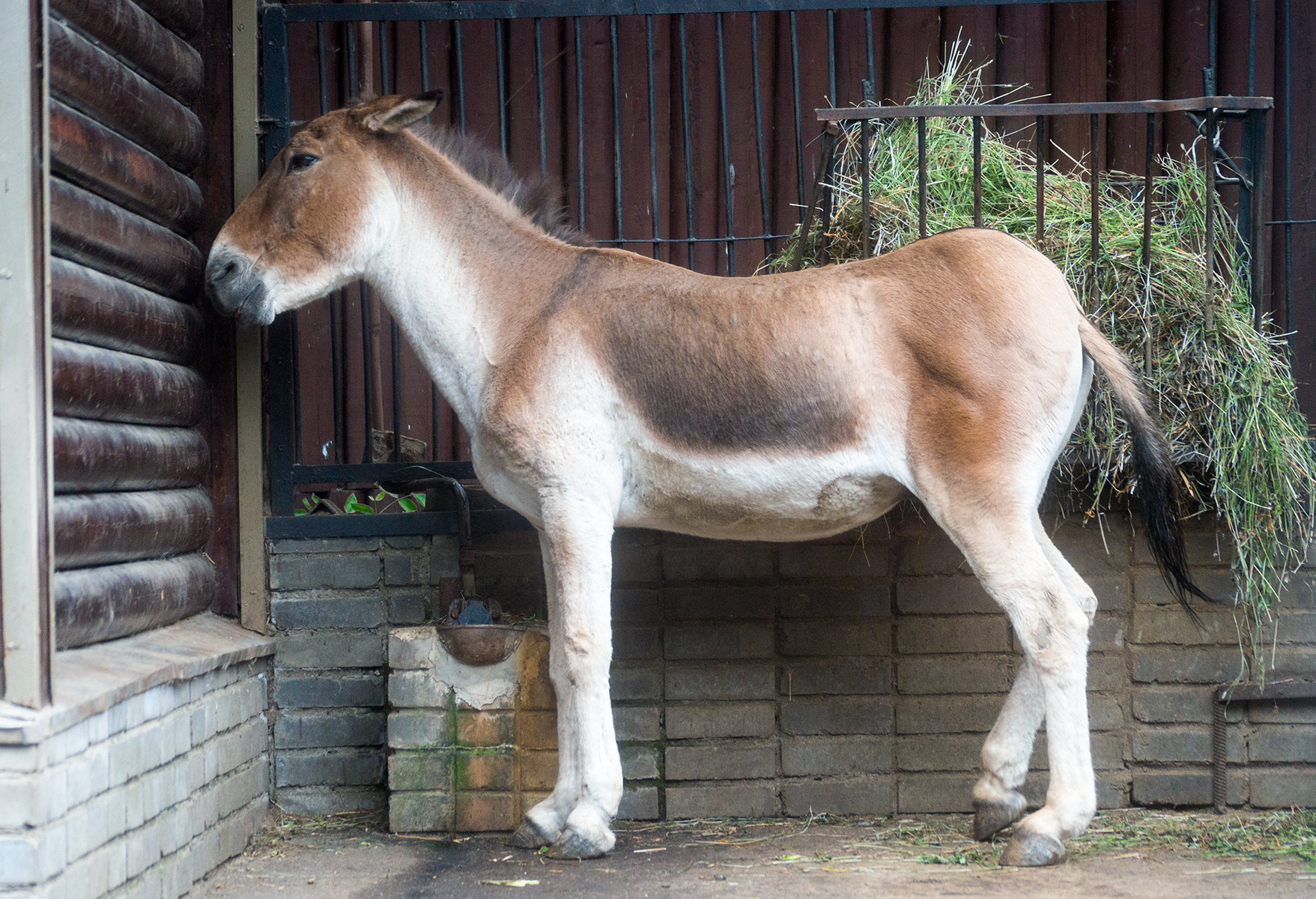 Кианг в Московском зоопарке